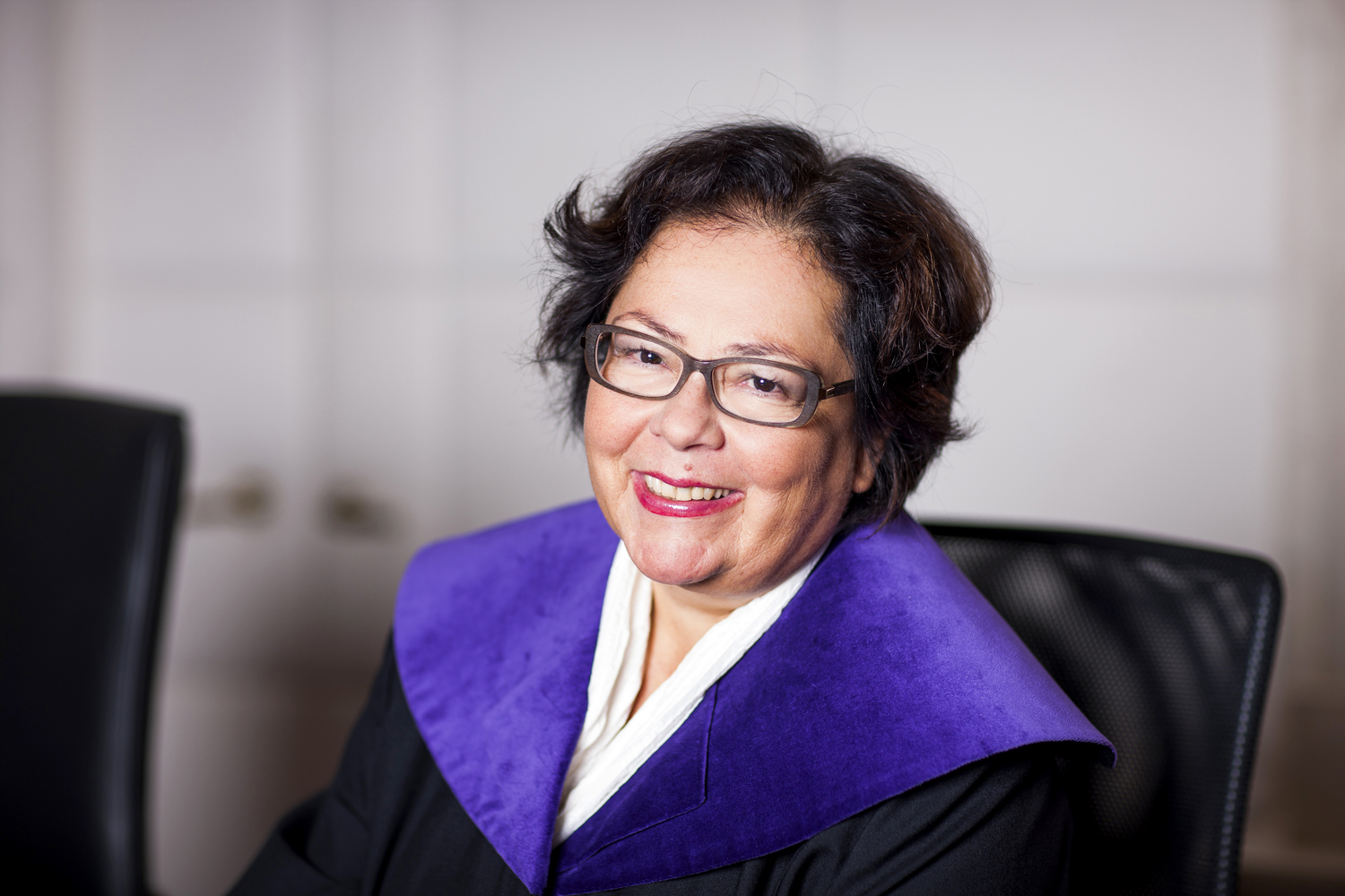 Dr. Claudia Kahr, Mitglied des österreichischen Verfassungsgerichtshofs seit 1999.